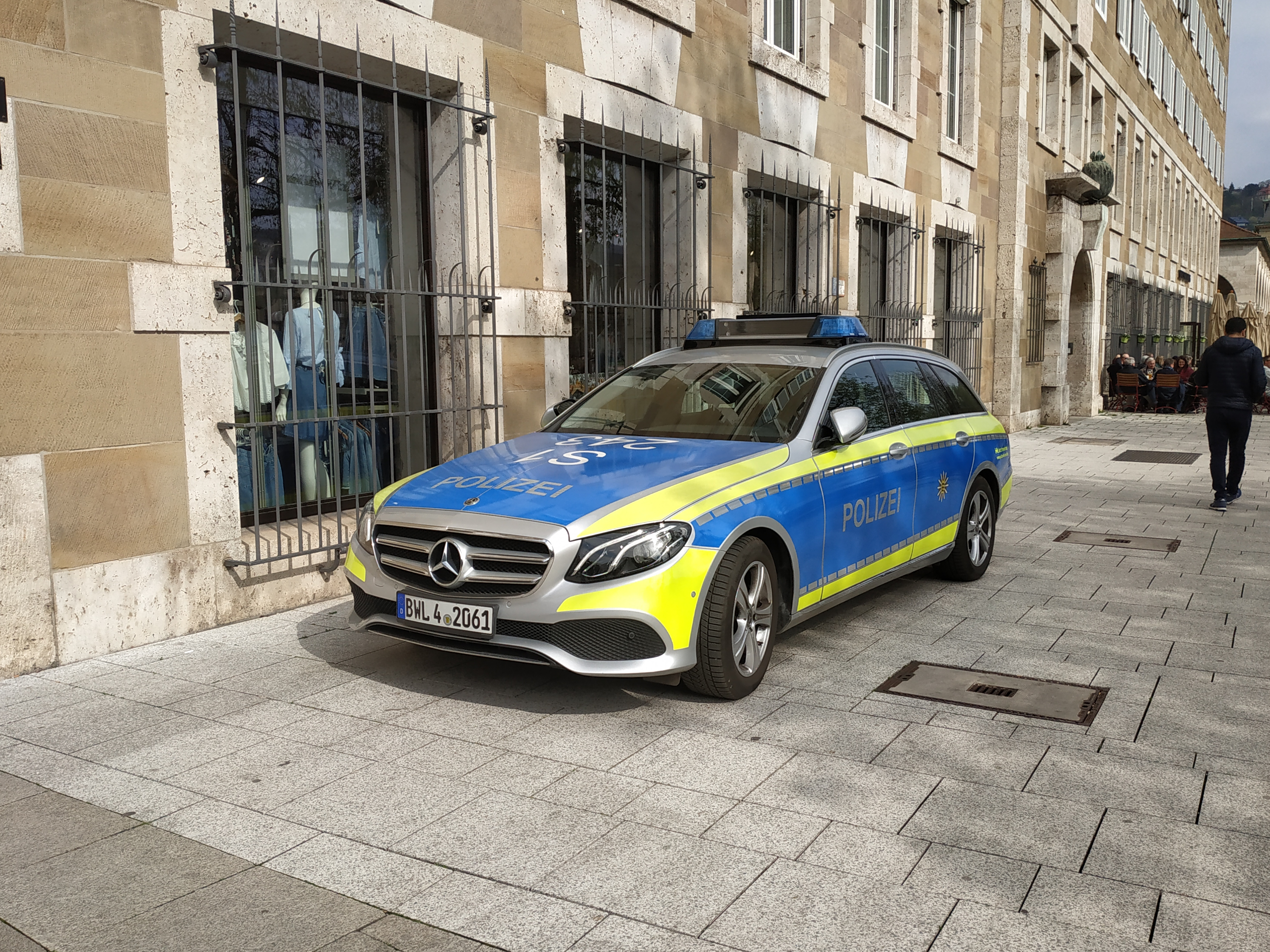 Mercedes-Benz classe C de la police à Stuttgart